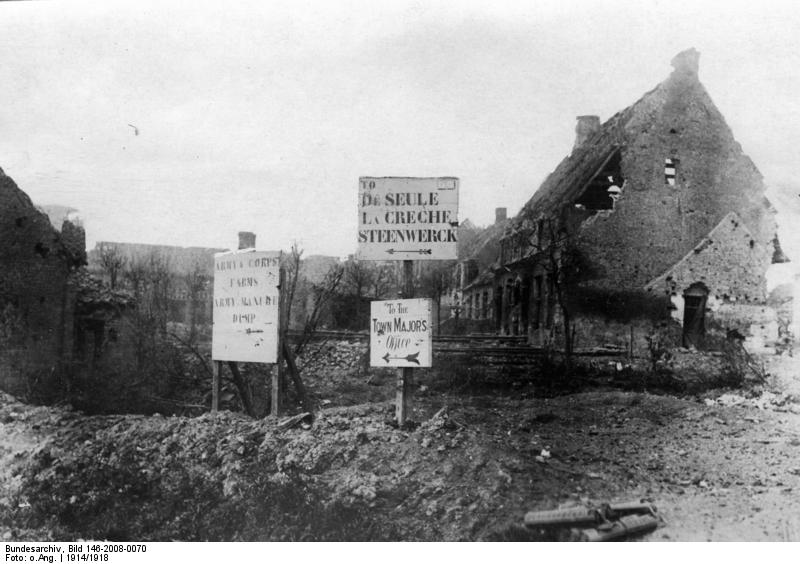 Ein ehemaliges gemütliches engl. Quartier im Kampfgelände des Kemmel. 8555 BUFA